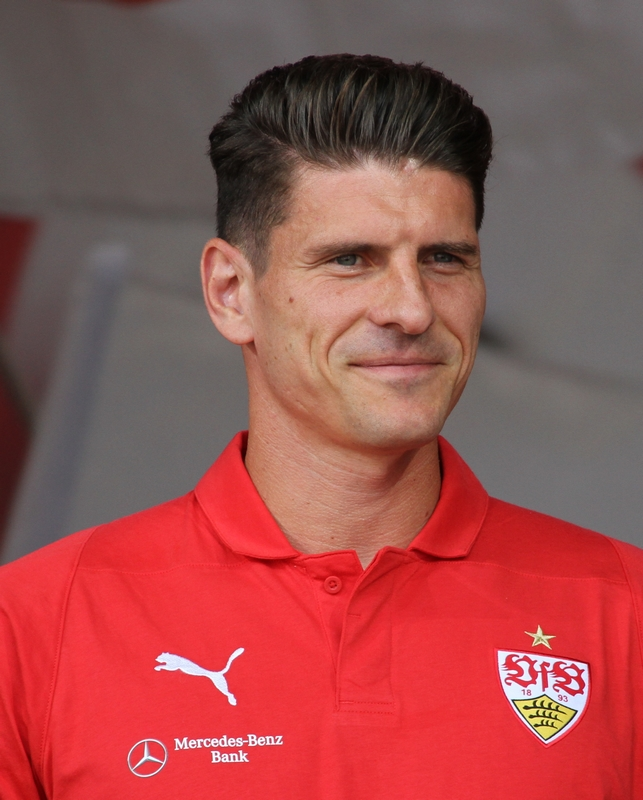 Mario Gomez beim Tag des Brustrings 2018. Aufgenommen von